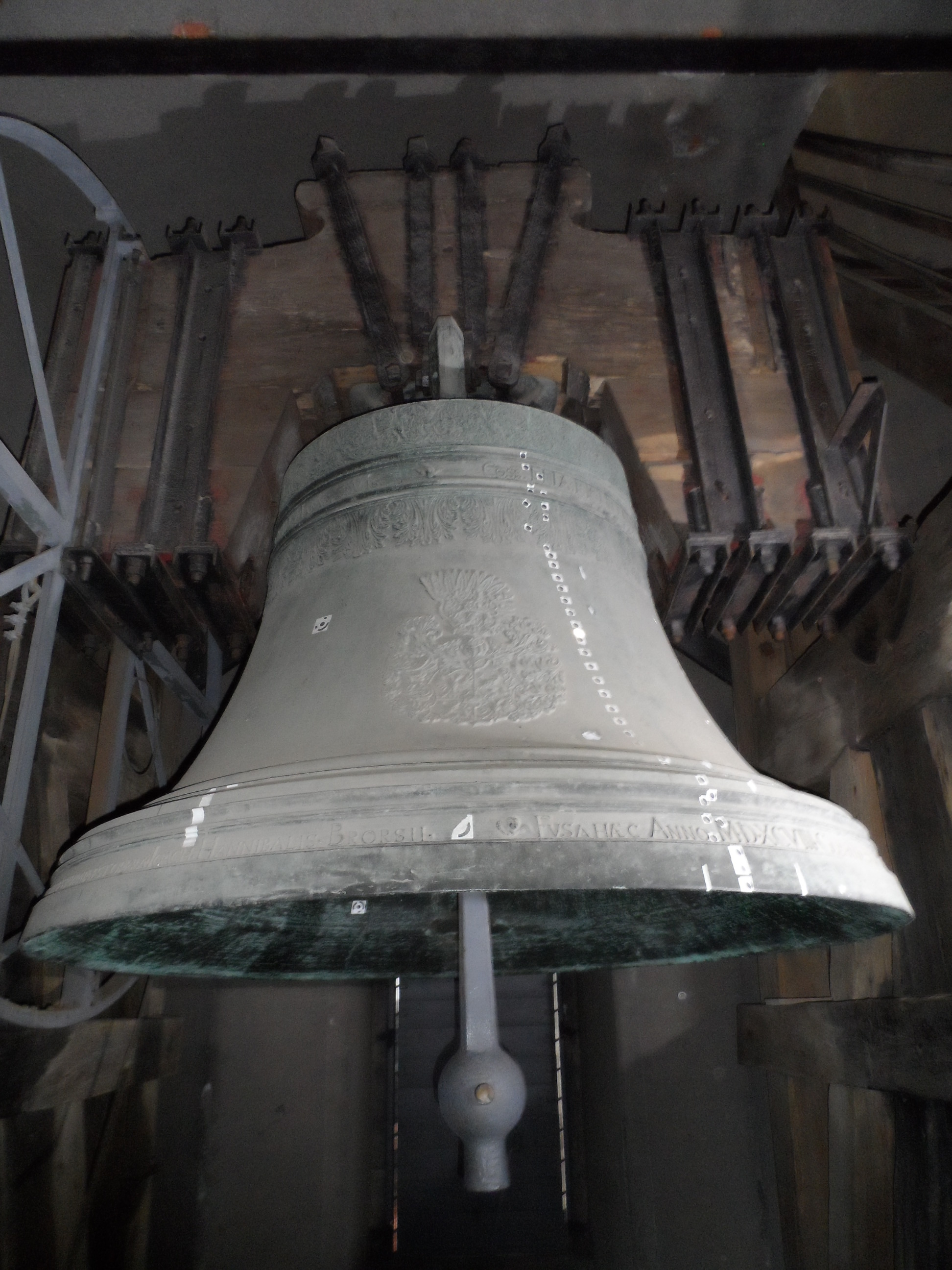 Große Glocke der Görlitzer Peterskirche